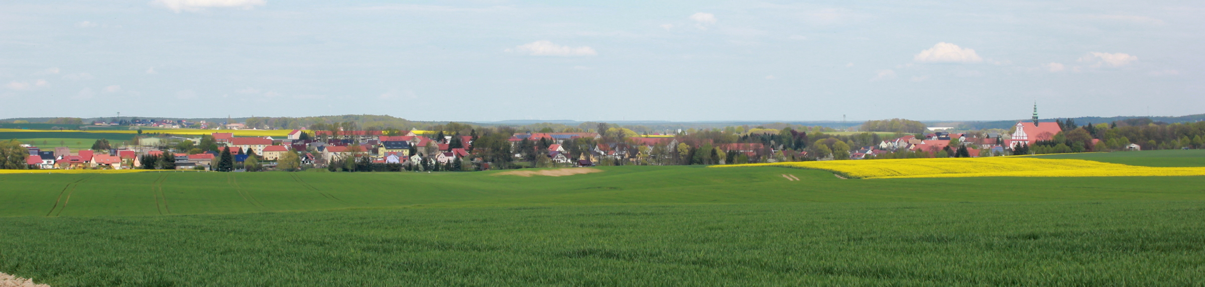 Hornjoserbsce: Napohlad Pančic-Kukow ze směra Wotrowa.